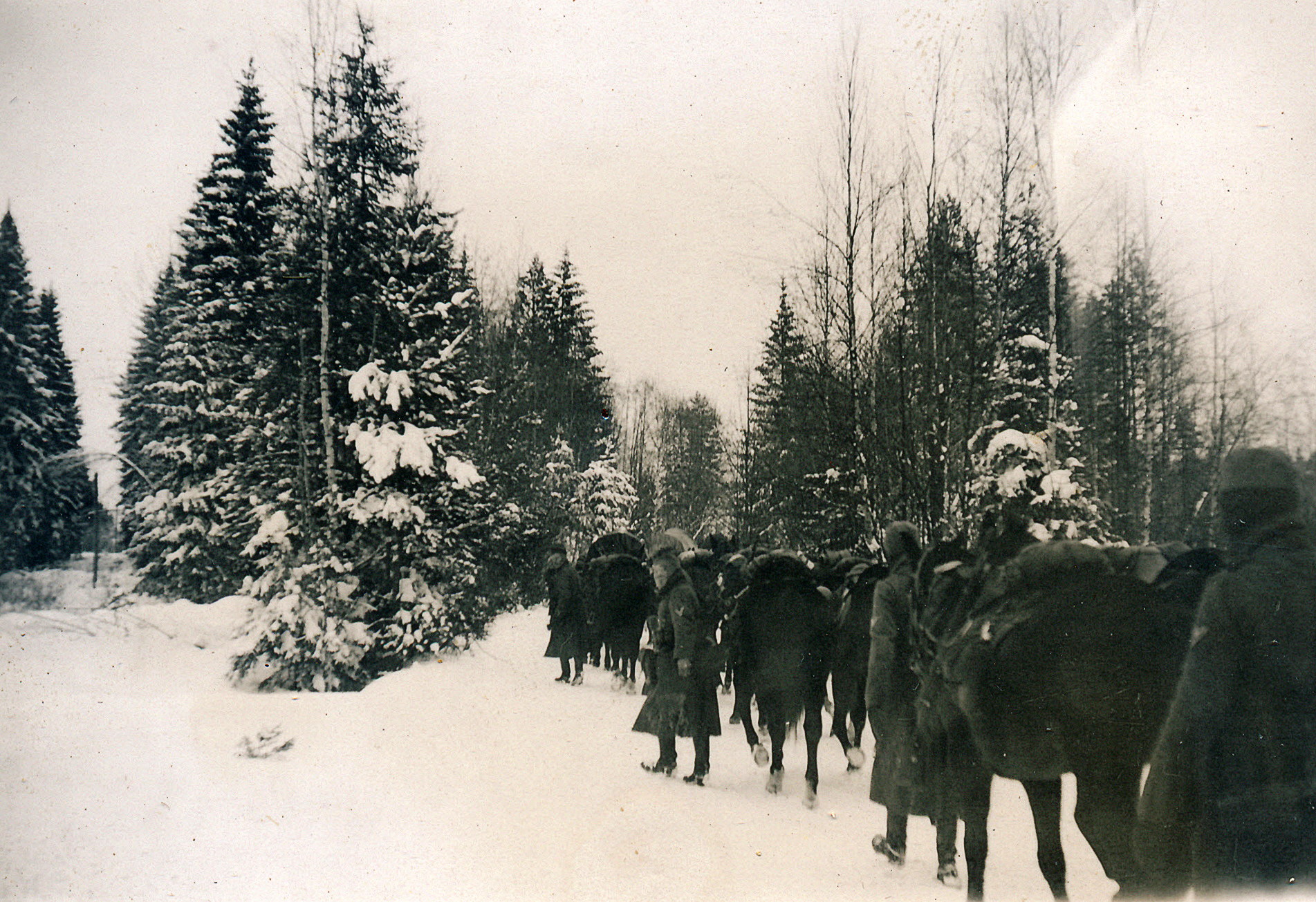 Bilder meines Großvaters, wären der Jahre 1939 bis 1943, Beschreibungen folgen später